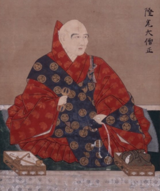 護持院隆光の頂相。